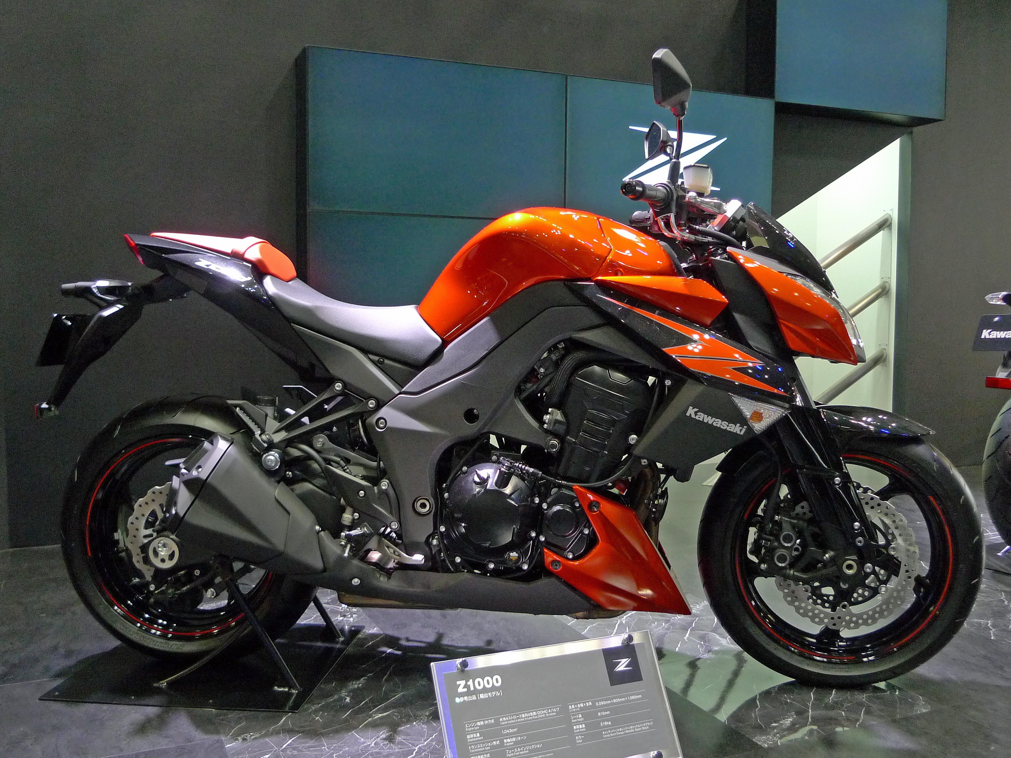 カワサキ・Z1000 2012 東京モーターショー2011にて撮影